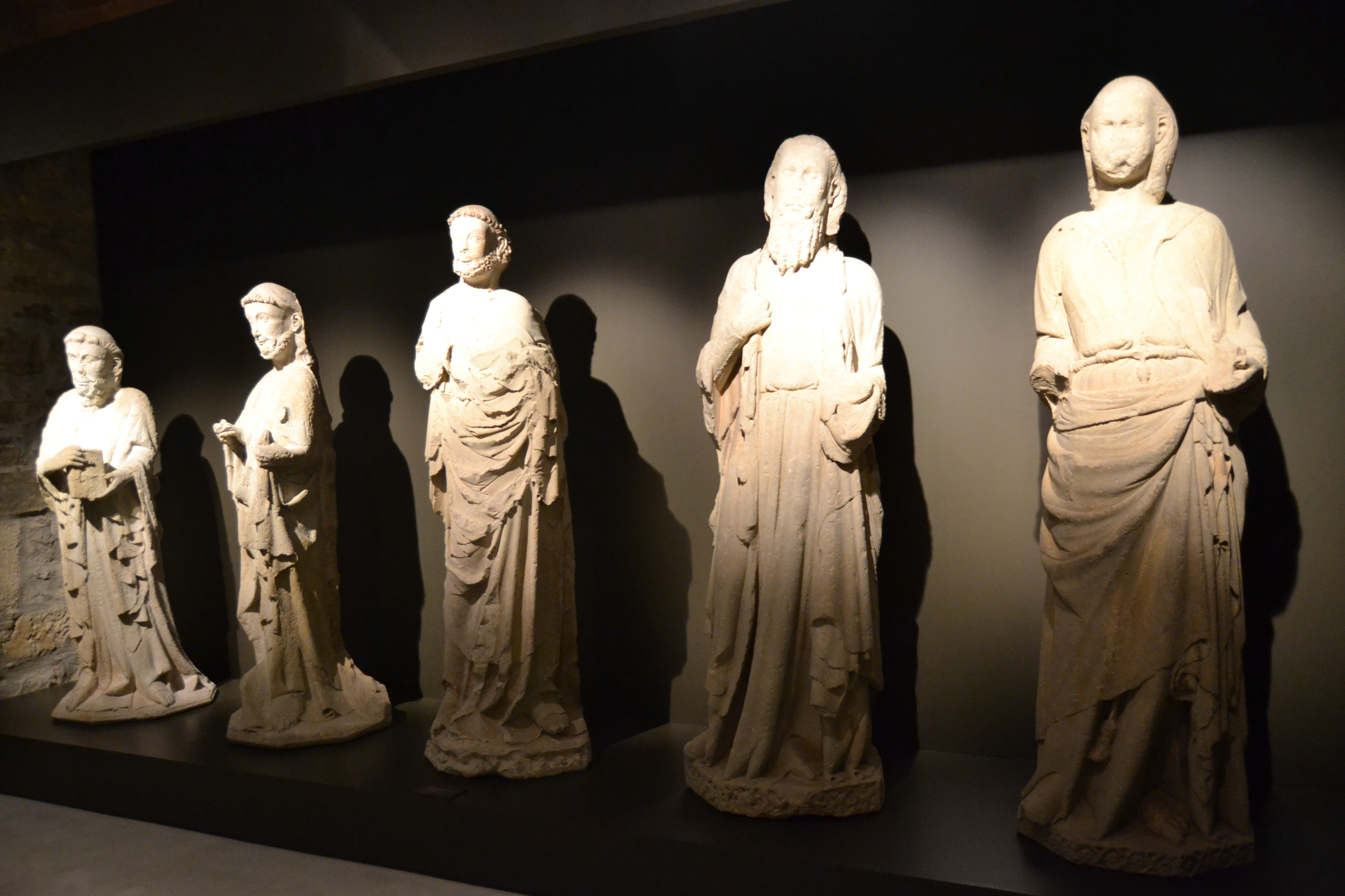 Troballes del Call. Tàrrega 1348